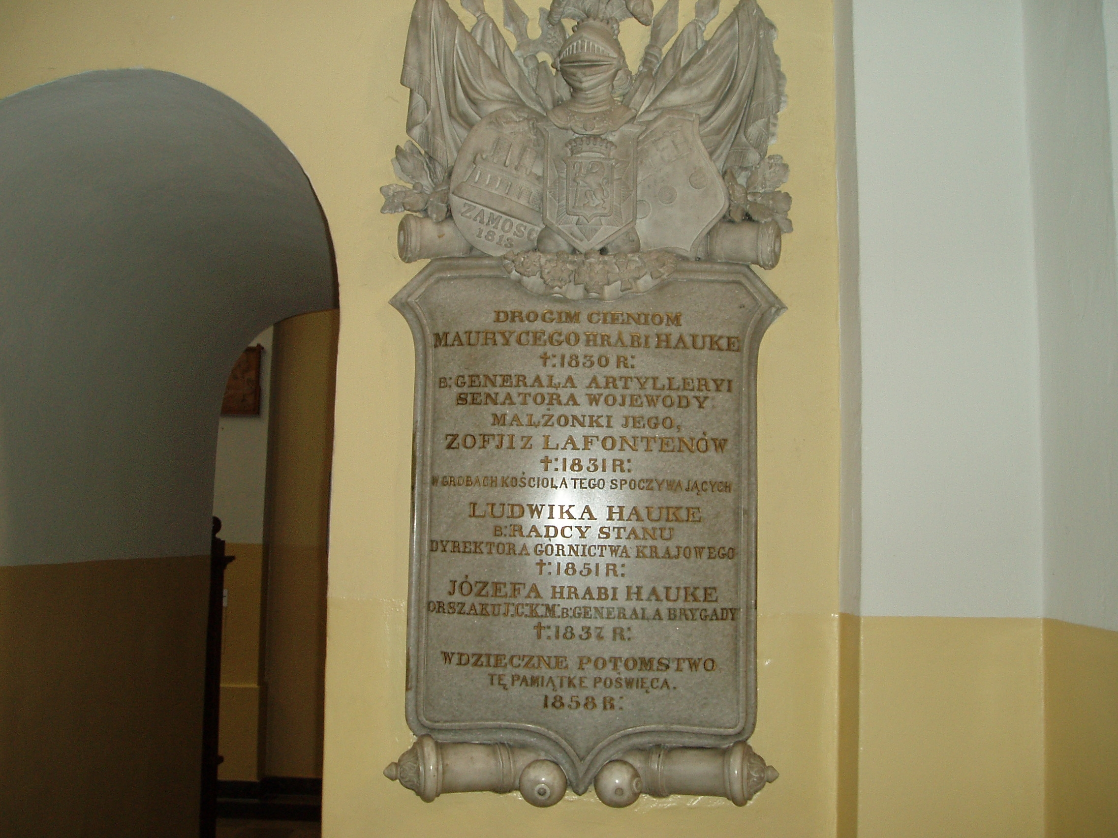 Maurycy Hauke, Epitafium Haukego, wlasna fotografia Wikipedysta:Alexvonf